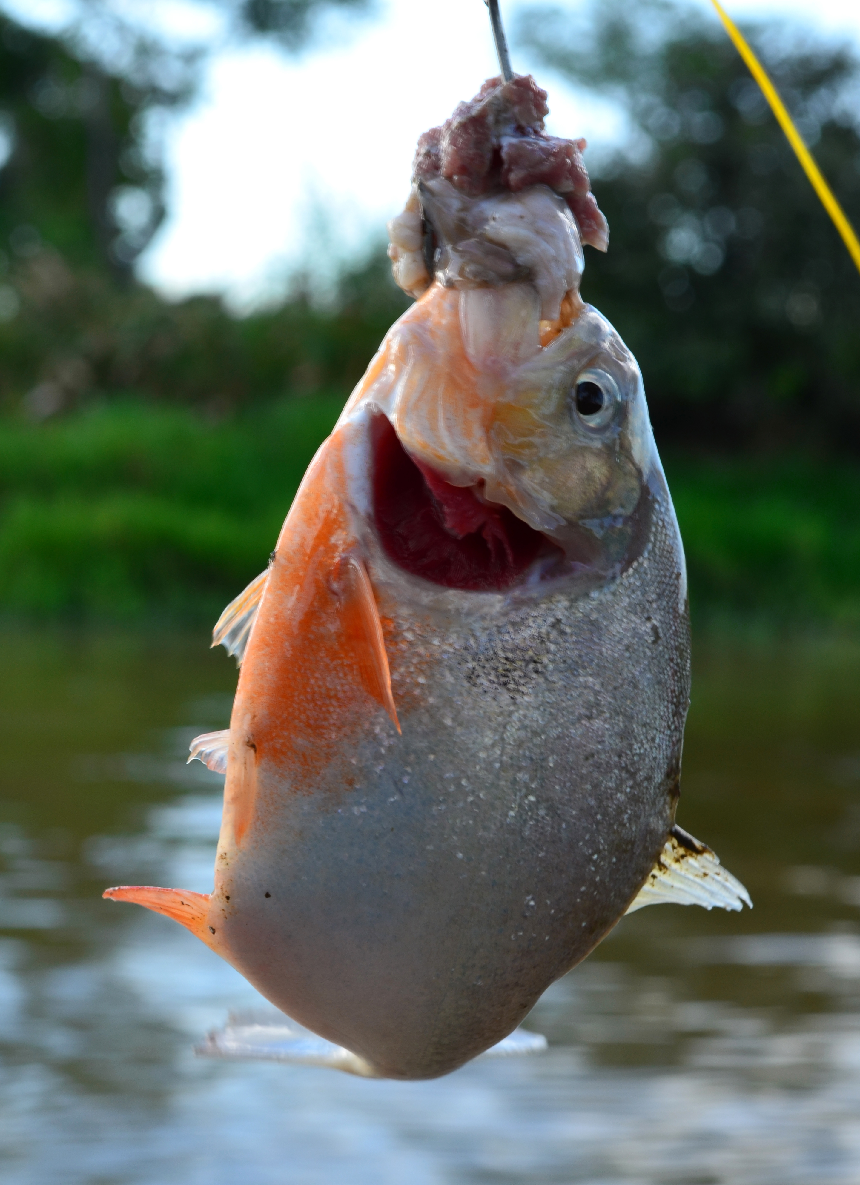 Cazador cazado, la piraña de los ríos llaneros ha sido pescada.